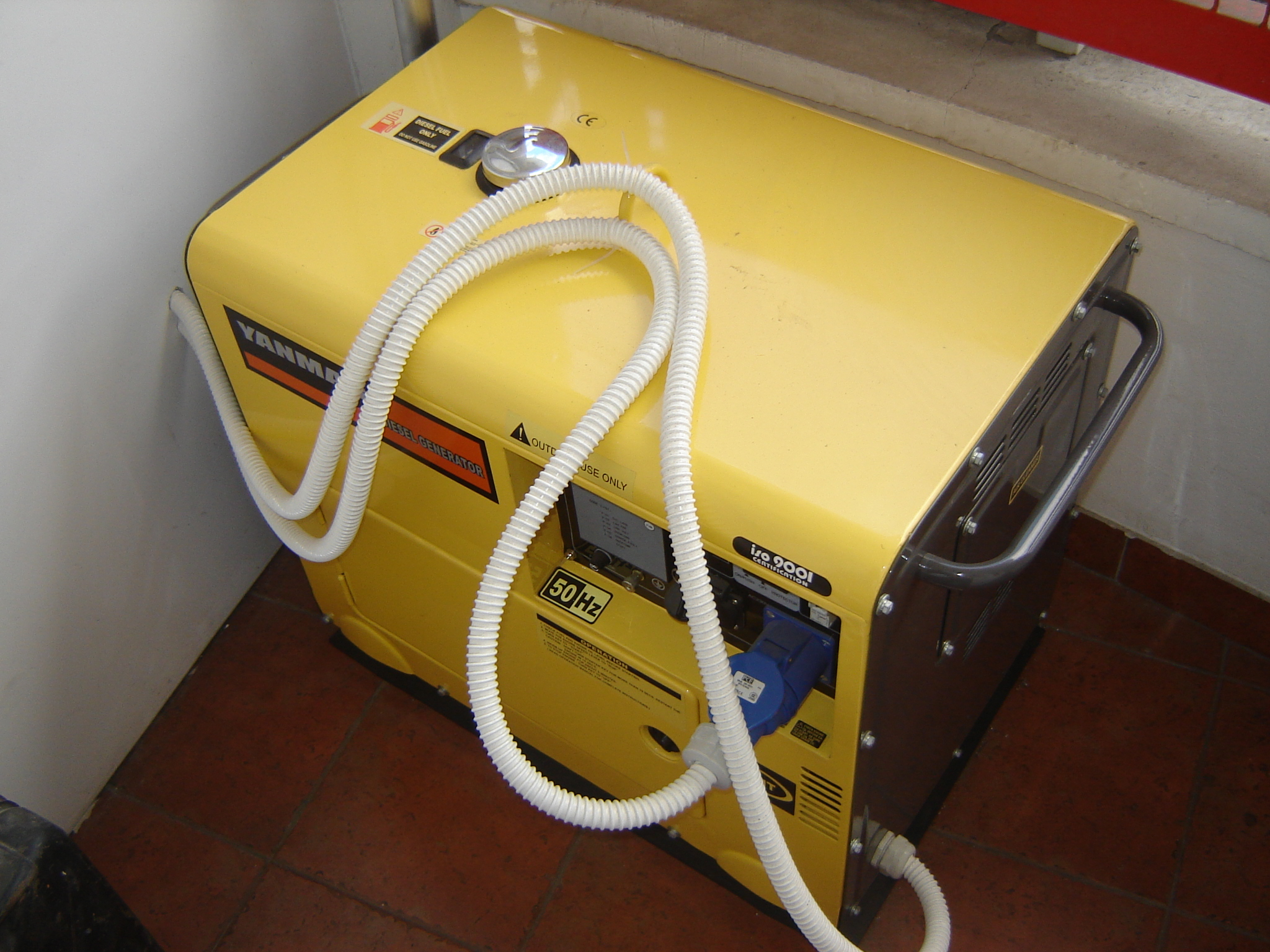 Агрегат марке YANMAR